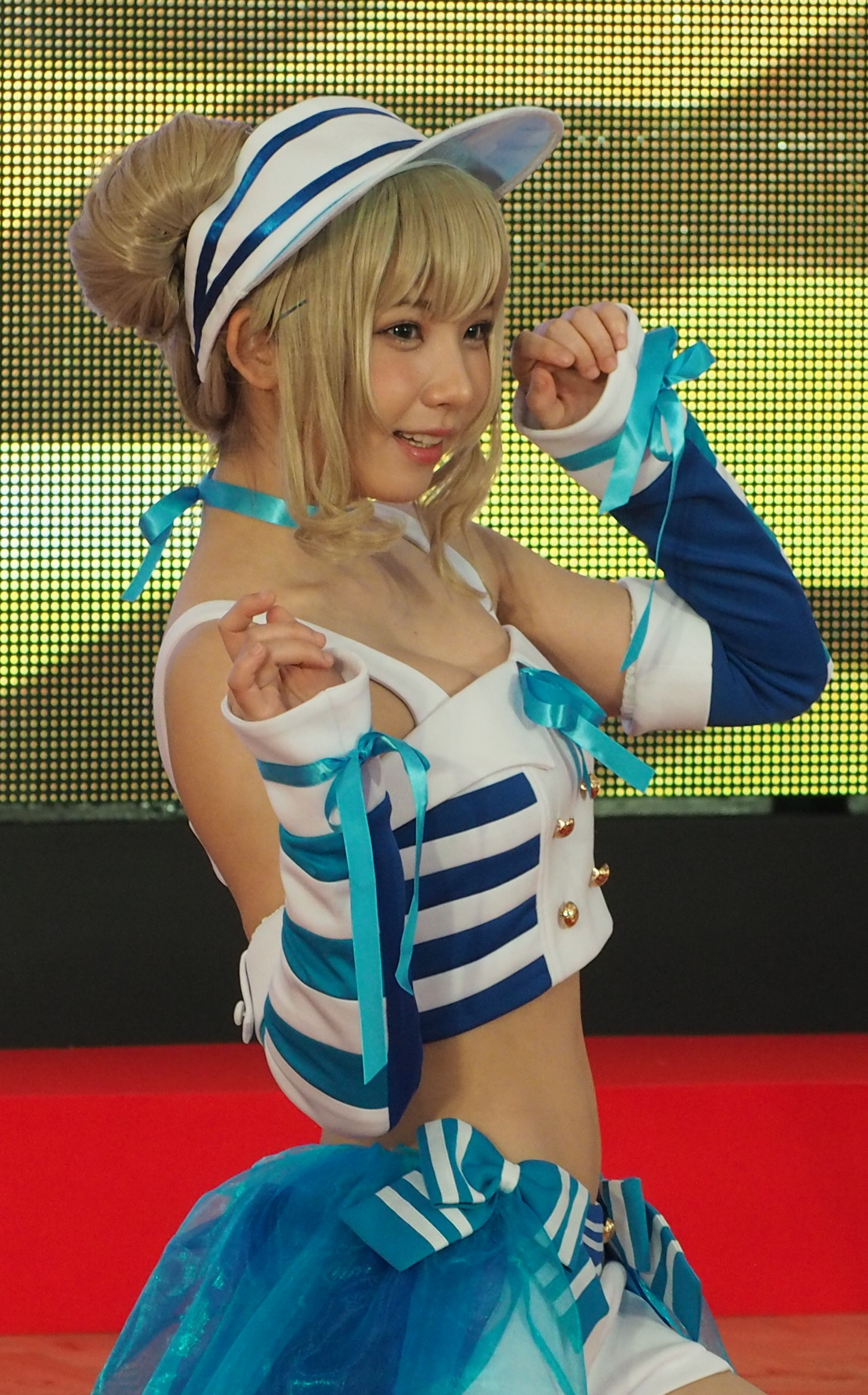 Enako as Matsuri Shizunami / えなこ・静波まつり